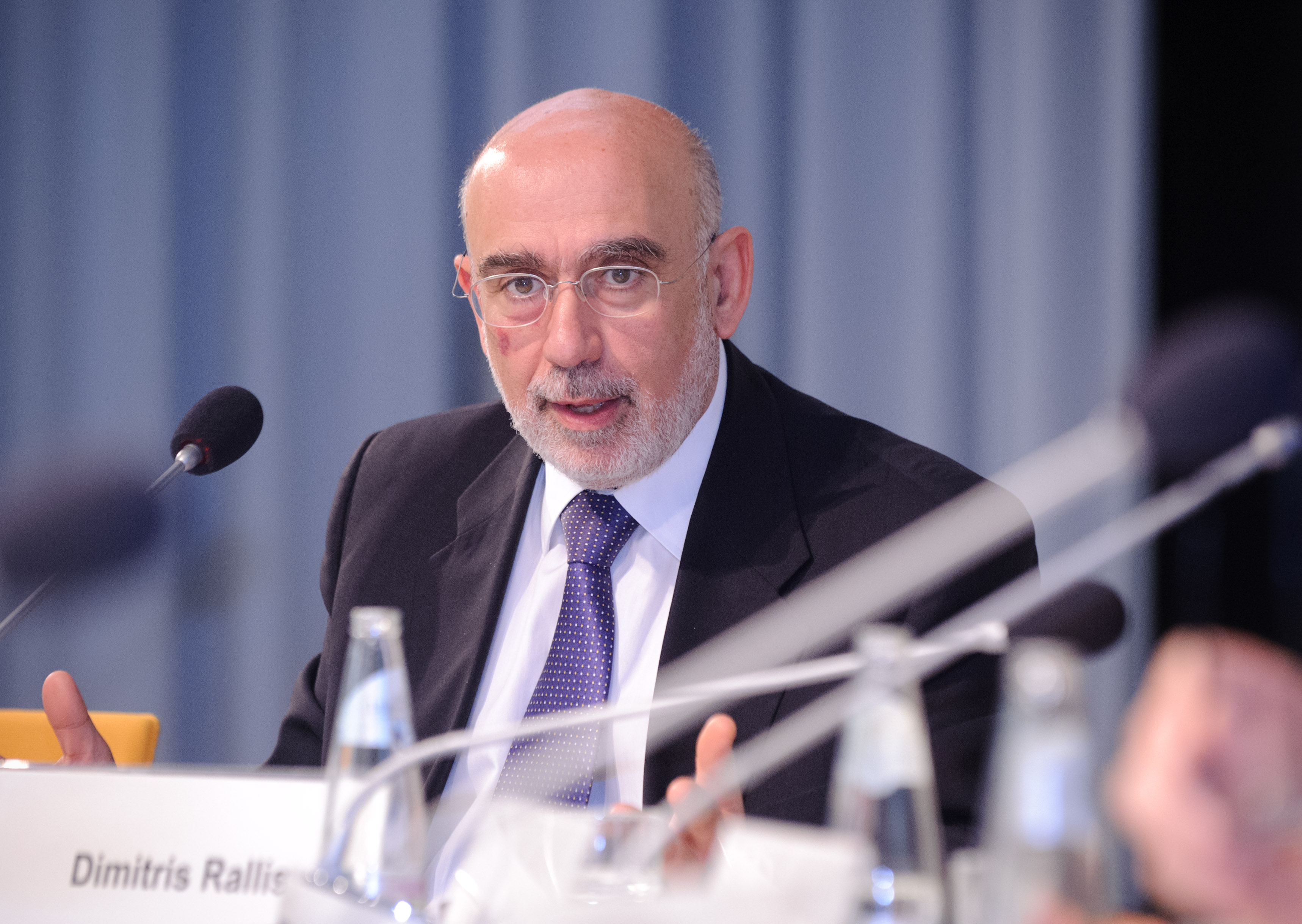 Dimitris Rallis (Botschafter von Griechenland in der Bundesrepublik Deutschland) Konferenz: Hellas in der Krise Foto: Stephan Röhl